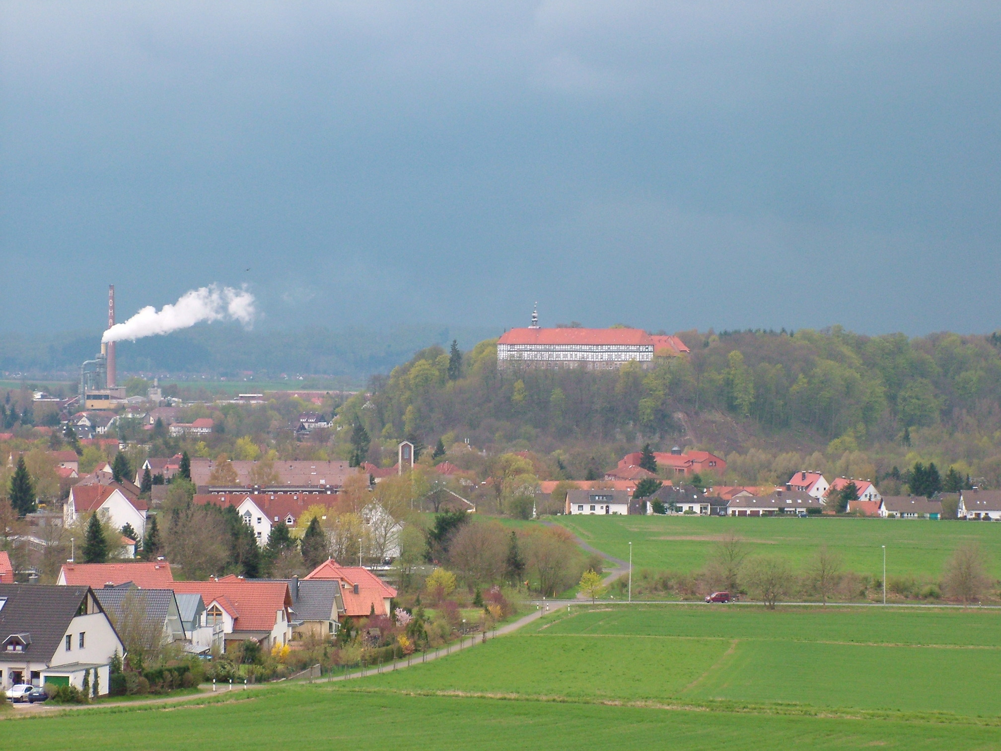 Schloss Herzberg